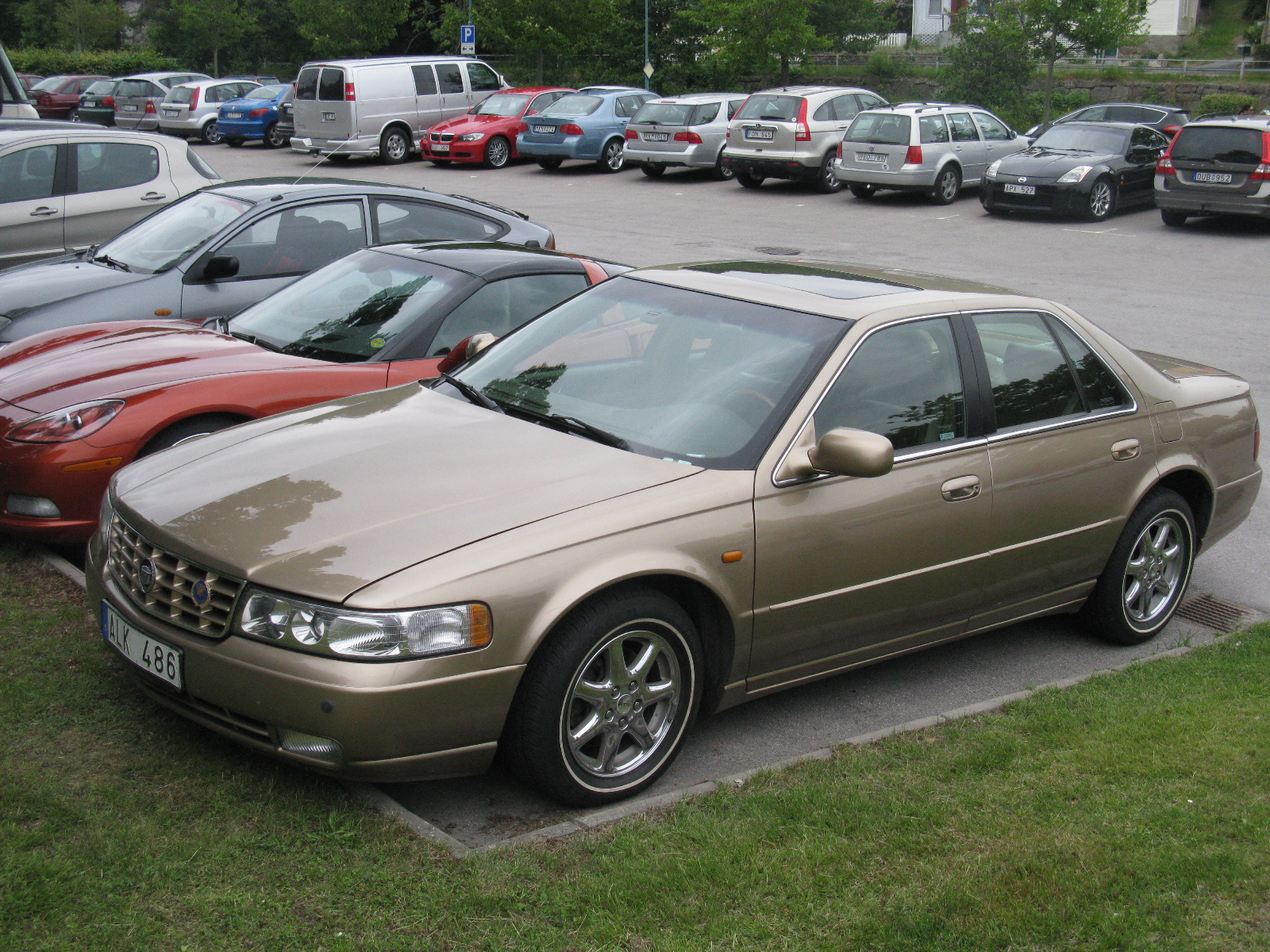 Cadillac Seville STS